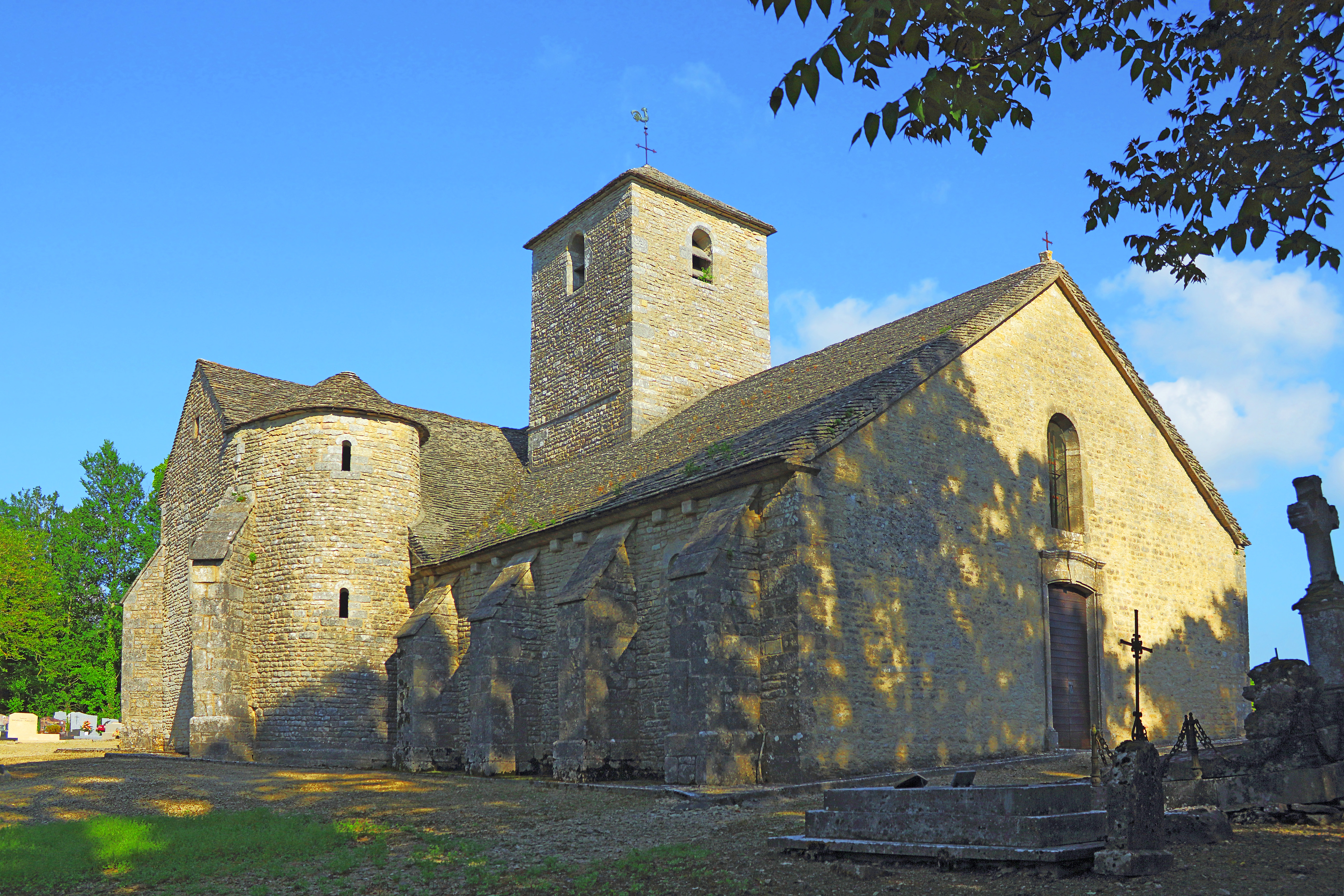 Église Saint-Marcel de Vix